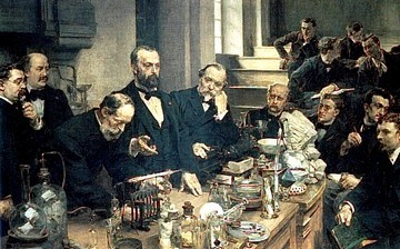 Le chimiste Henri Sainte Claire Deville : leçon sur l’aluminium, peinture de Léon Augustin Lhermitte.